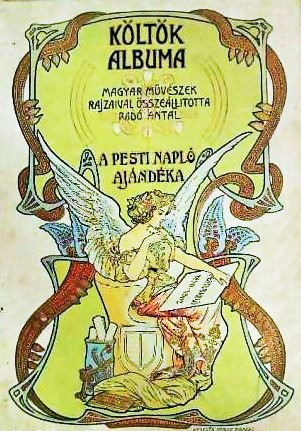 Költők albuma